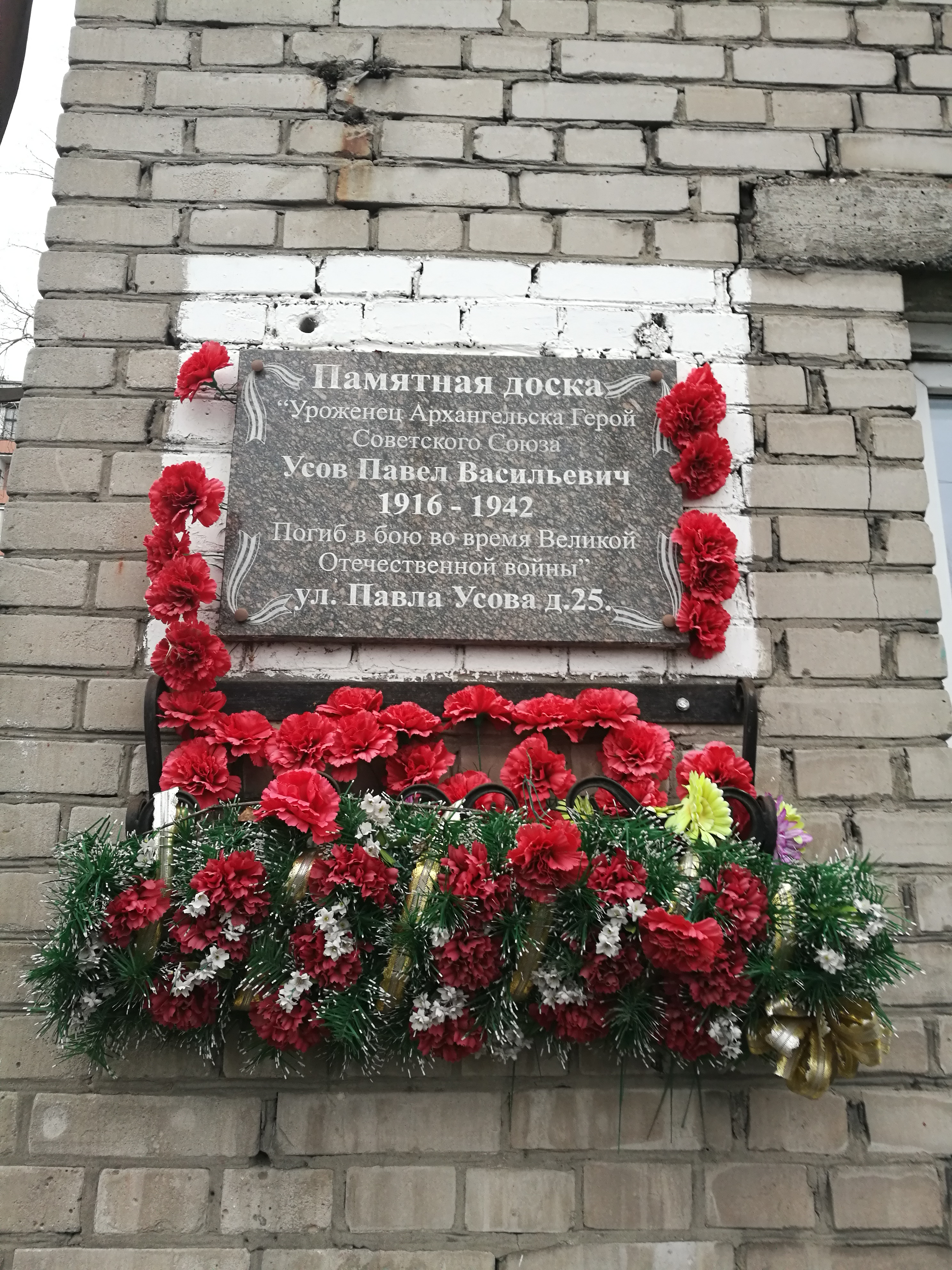 Мемориальная доска Павлу Васильевичу Усову на фасаде жилого дома по адресу г. Архангельск, ул. Павла Усова, 25. На доске высечен текст: «Уроженец Архангельска, Герой Советского Союза Усов Павел Васильевич 1916–1942 Погиб в бою во время Великой Отечественной войны»